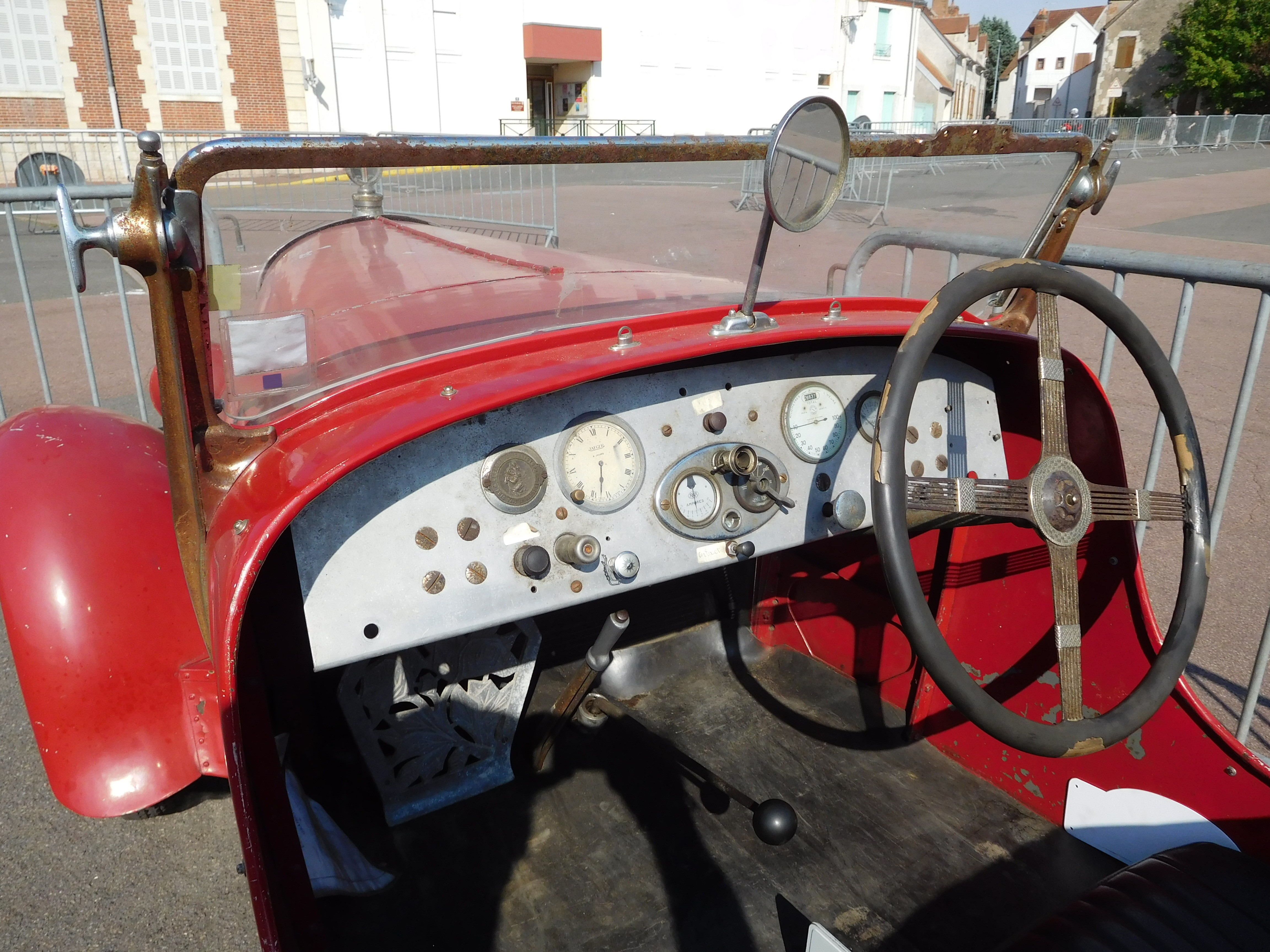 Amilcar type G de 1927, Briare, Loiret, France.